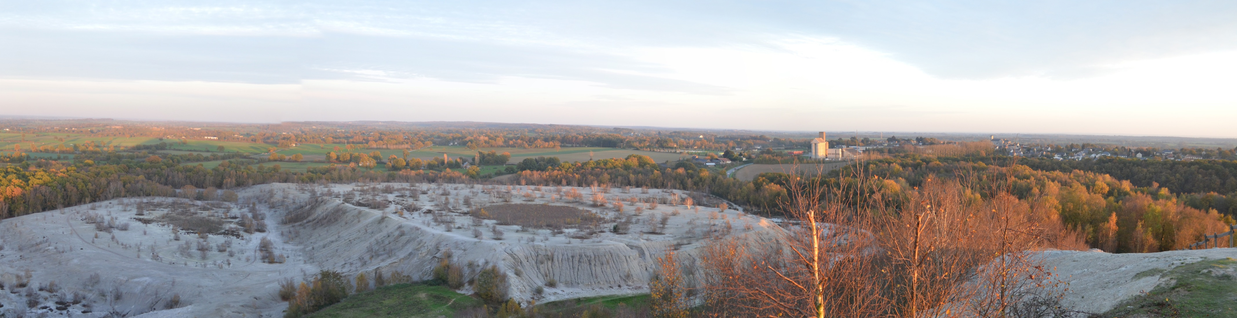 Panorama sur Abbaretz depuis le sommet du terril - Abbaretz (Loire-Atlantique)